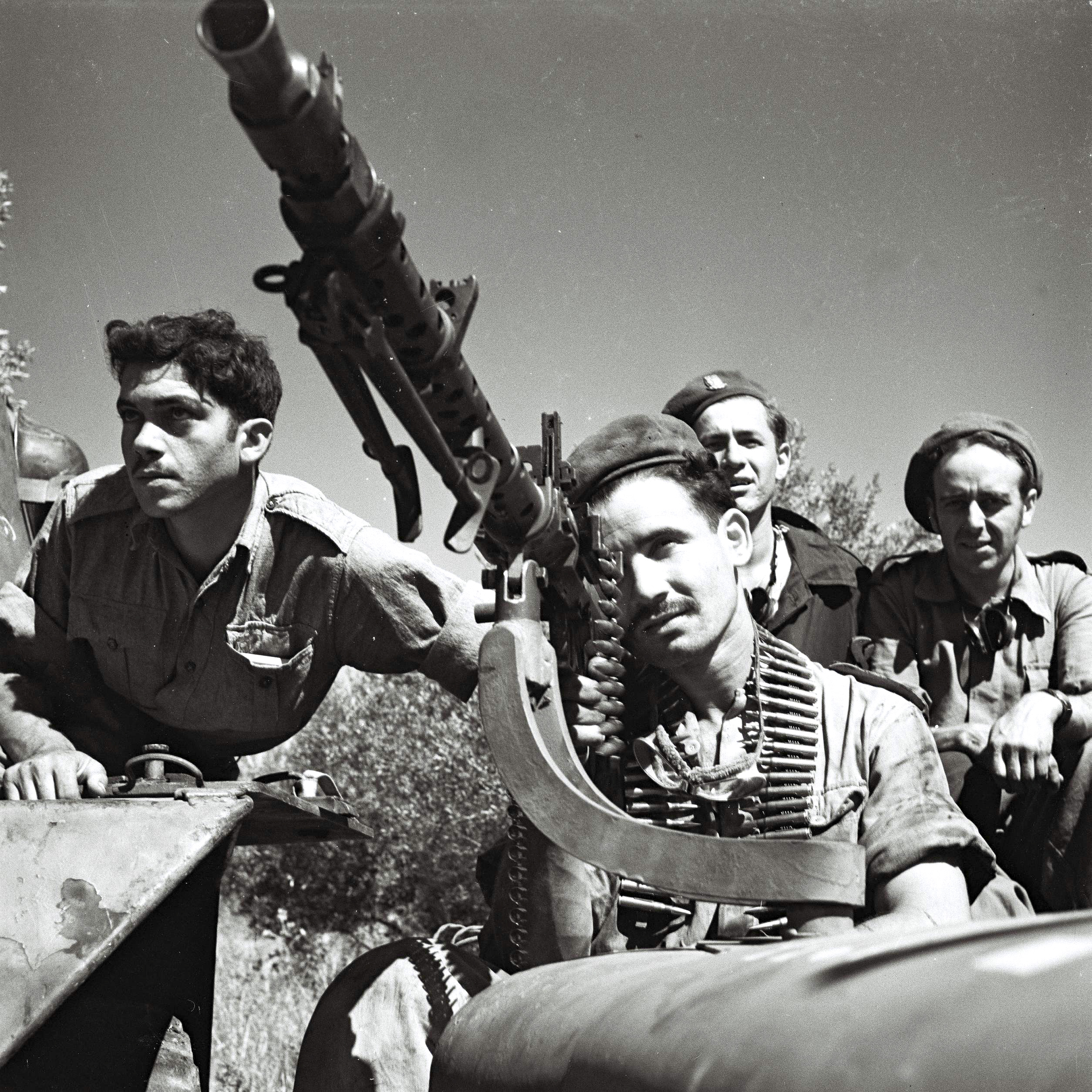 התמונה צולמה על ידי זולטן קלוגר (1977-1896), צלם ישראלי הונגרי שפעל ותיעד את החיים בארץ ישראל. היא צולמה ב-4/10/1948 ומצולמים בה חברי חטיבה 8 עם מקלע MG34, נשק מתוצרת גרמנית. חטיבה 8 הייתה חטיבת השריון הראשונה בצה"ל והיא הוקמה ב-24 למאי 1948, תחת פיקודו של יצחק שדה. בתחילתה החטיבה כללה שני גדודים, גדוד 81 וגדוד 82 המשוריין, גדוד זה היה גדוד הטנקים היחיד בצה"ל באותה העת. חטיבה 8 לקחה חלק במבצע 'דני', שהיה המבצע העיקרי בקרבות עשרת הימים במלחמת העצמאות, וזו הייתה הפעם הראשונה שהופעלו טנקים של צה"ל בקרב. התמונה צולמה ב- 4/10/1948, כנראה בזמן ההכנות למבצע 'יואב', בו השתתפה החטיבה בין ה-15 ל-22 באוקטובר. תמונה זו נחקרה על ידי: דניאל רינון חמו , טלי גיל ודנה אהרן יונגרמן, במסגרת קורס אקדמי במכללת סמינר הקיבוצים. Photo: KLUGER ZULTAN.